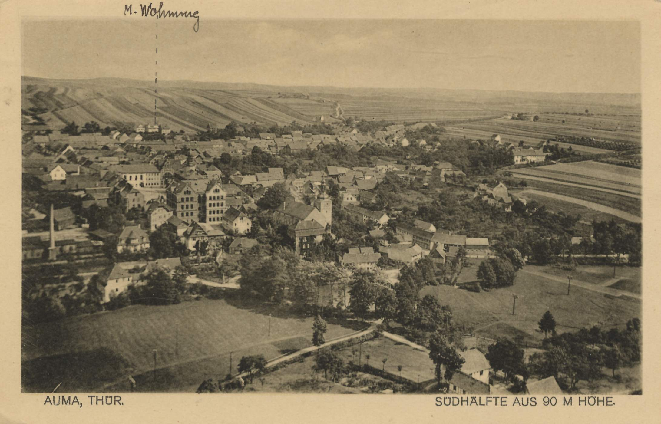 Südlicher Stadtrand von Auma, Schrägaufnahme vom Ballon oder Flugzeug